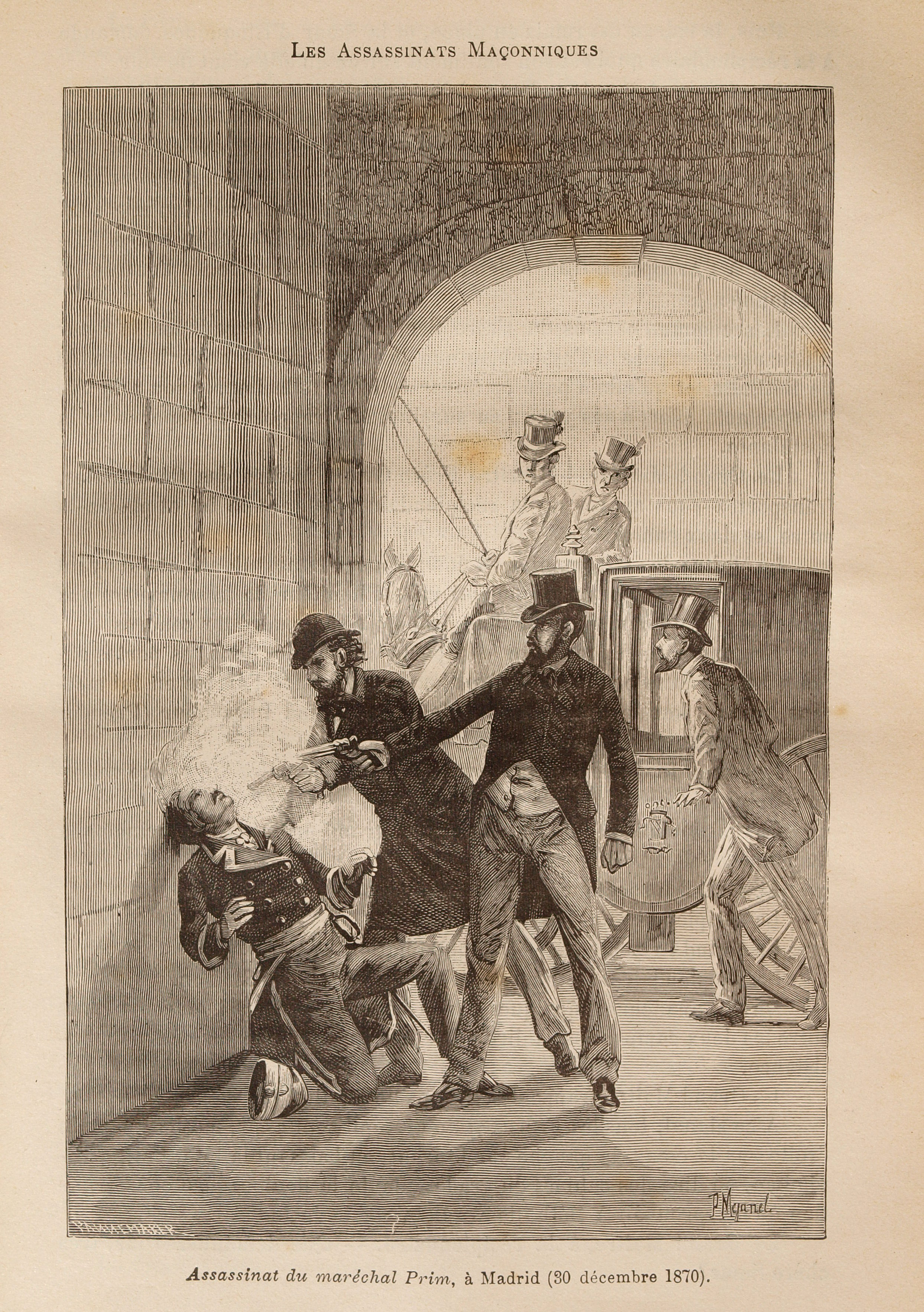 Une des gravures du document de Léo Taxil, Les Mystères de la Franc-Maçonnerie, Paris, 1886.